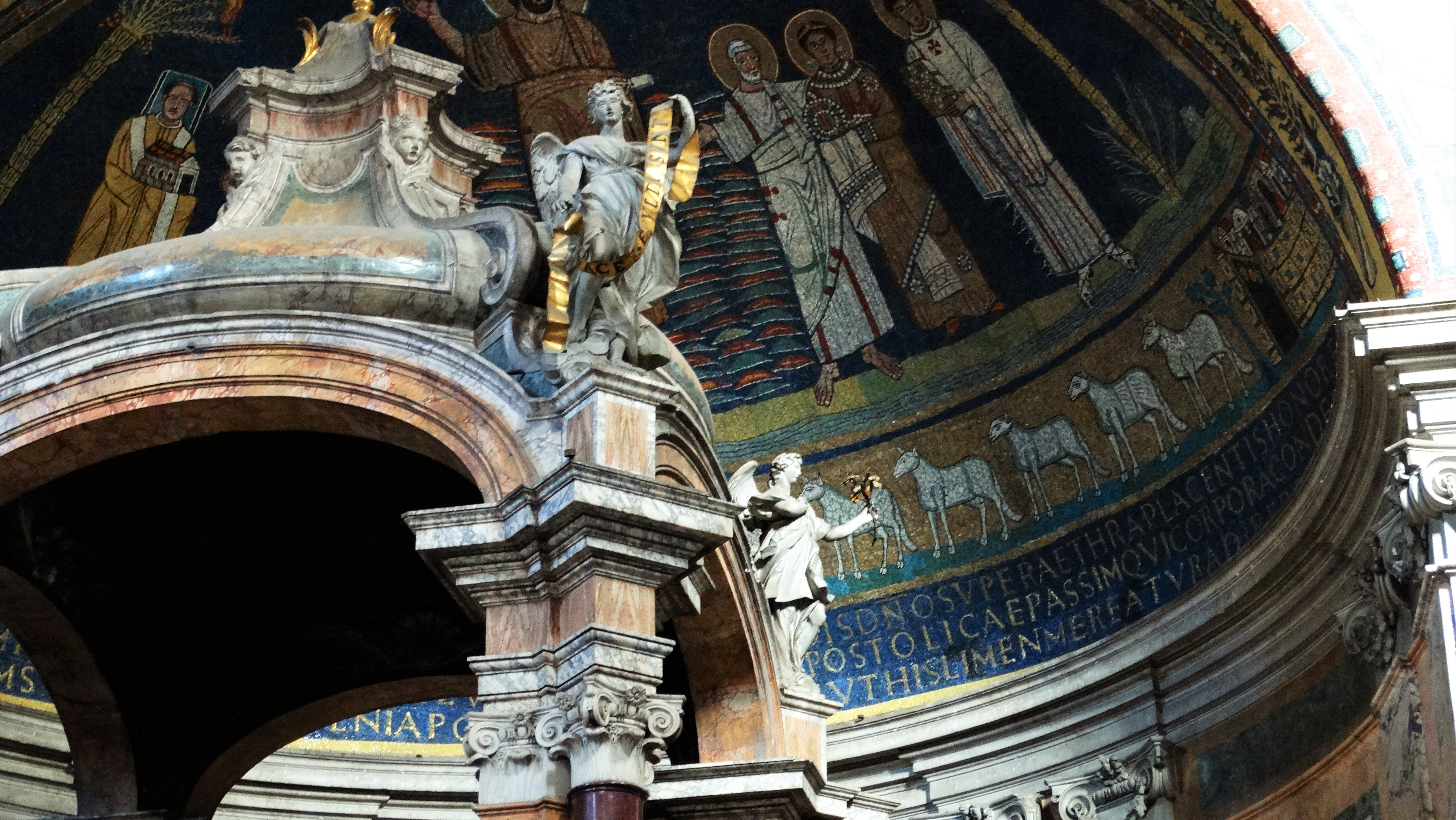 Ciborio, angeli in stucco di Giuseppe Rusconi